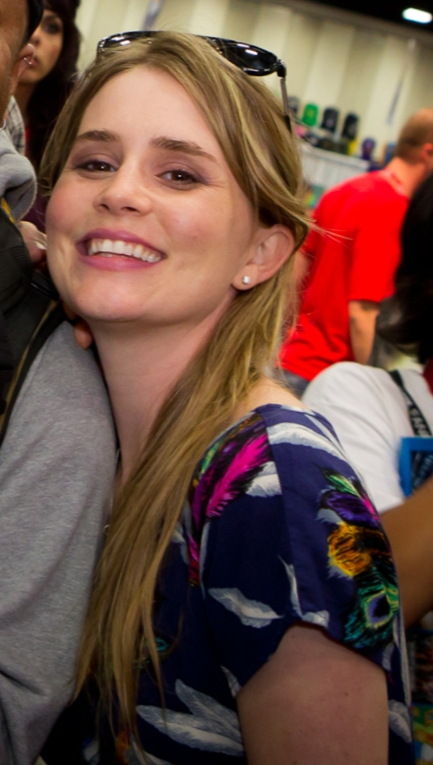 Alison Lohman (2011)